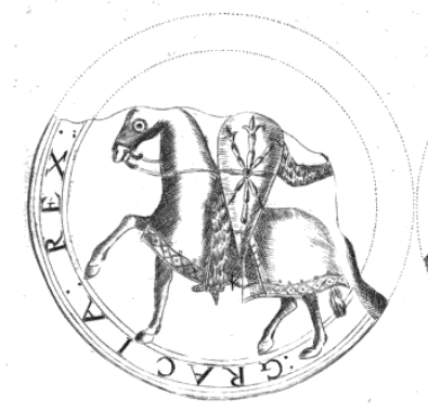 Sancho VI. Navarrský